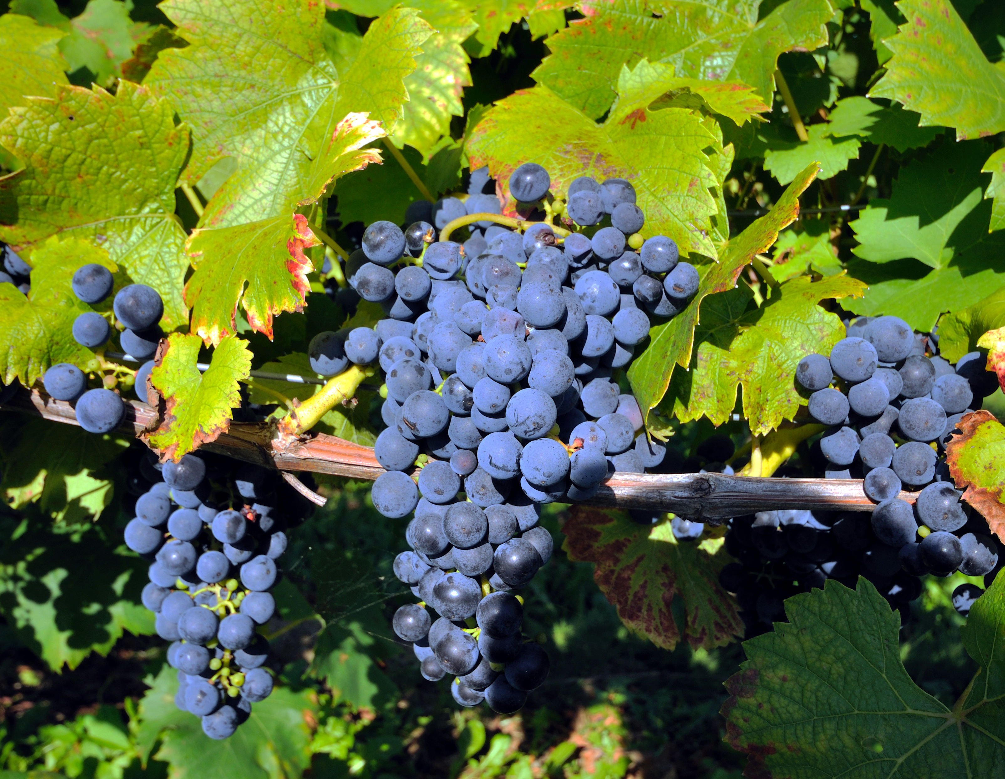 Trauben und Blätter des blauen Spätburgunders